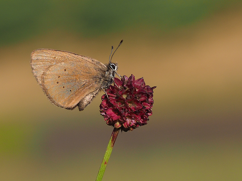 Mariposa Phengaris nausithous procedente de la Cordillera Cantábrica, España.